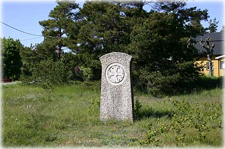 Mitt i vägkorsningen står minnesstenen på bilden ovan, rest 1961, 600 år efter Atterdag, för att hedra de gutar som slogs för sin frihet.